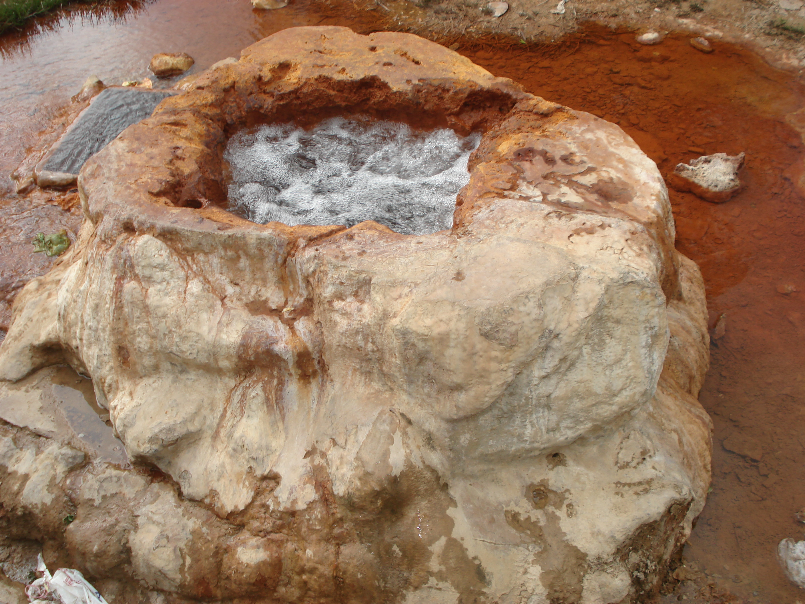 «Գրավի» աղբյուրը